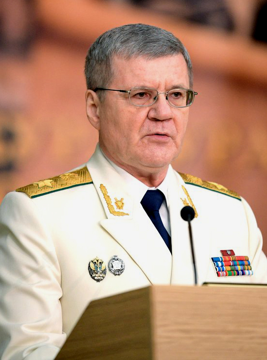 Генеральный прокурор Юрий Чайка на торжественном заседании, посвящённом 295-летию российской прокуратуры